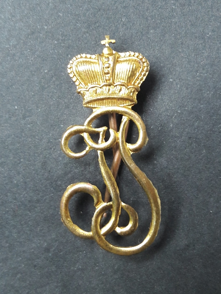 Monogram JP pod koroną - znak 8 Pułku Ułanów im. Księcia Józefa Poniatowskiego